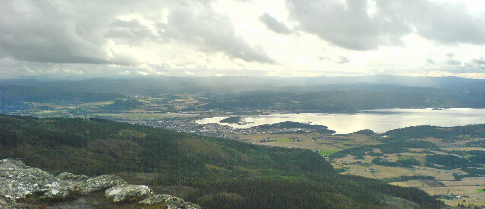 Stjørdal seen from Forbordsfjellet. Cropped version of File:Stjoerdal.JPG.